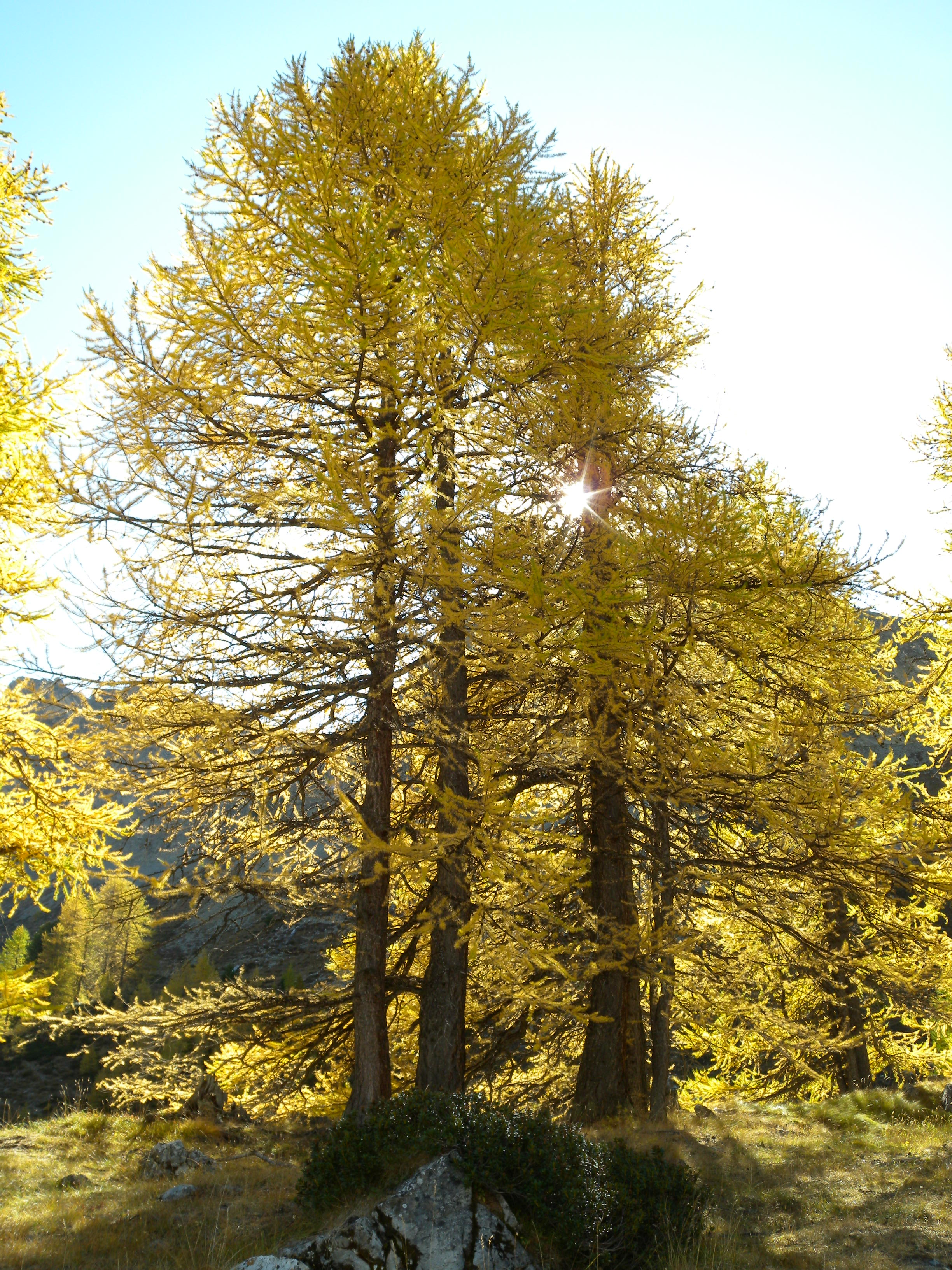 Larix decidua, Parc régional du Queyras, Embrun, Hautes-Alpes, France